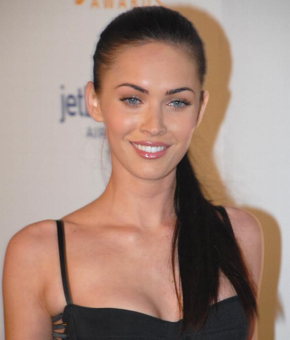 Megan Fox.